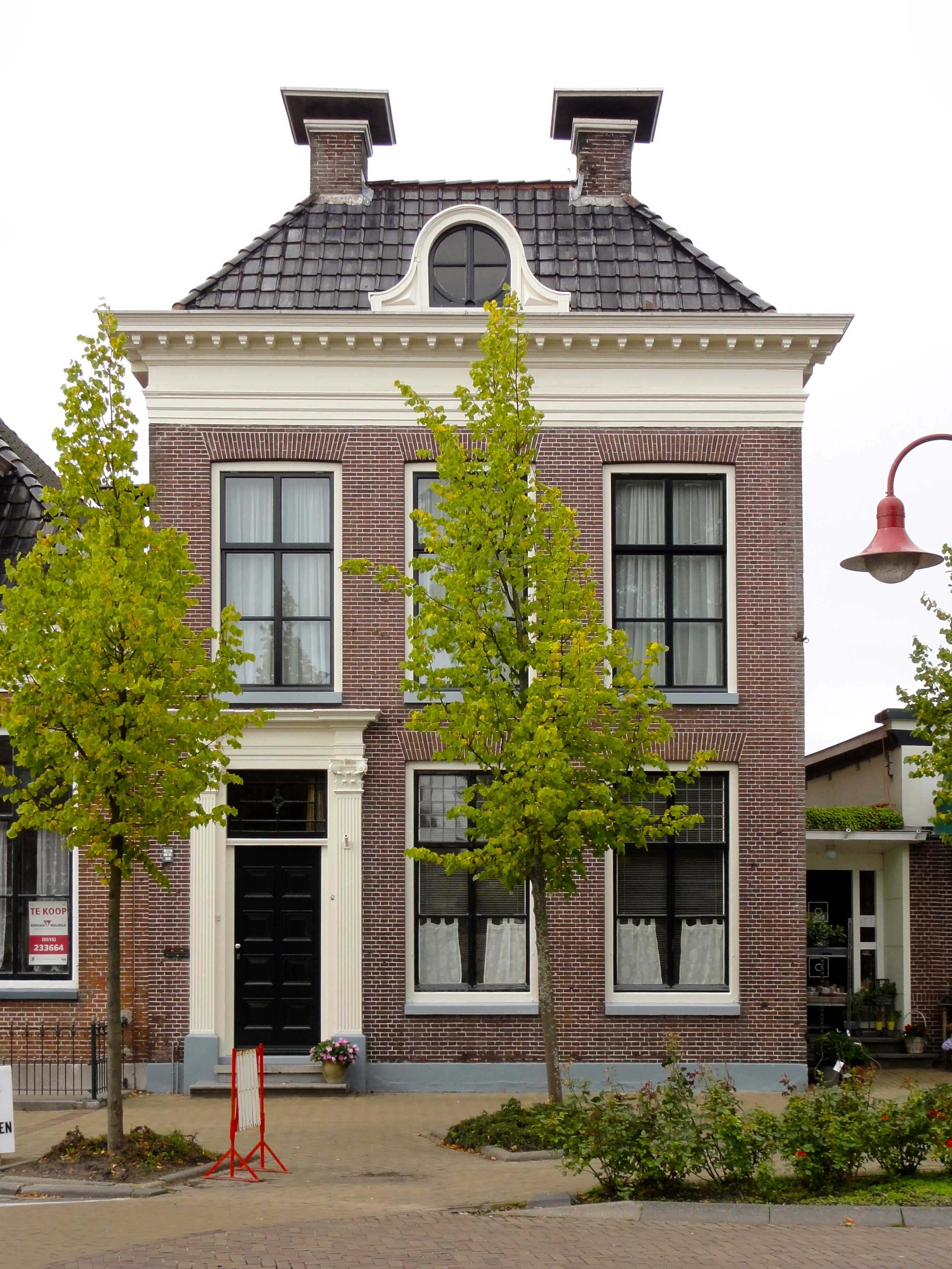 Kerkstraat 47 te Makkum